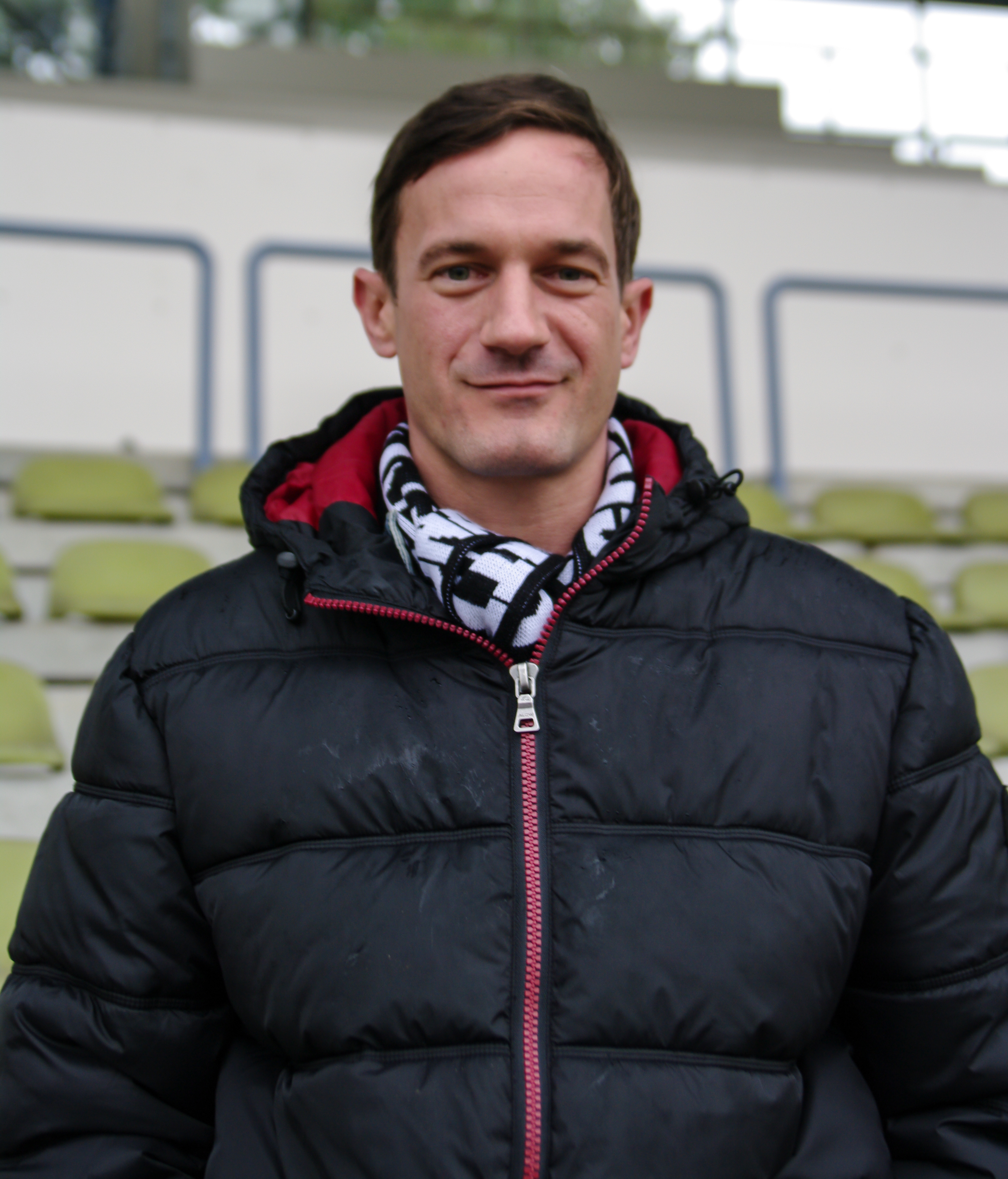 Set-Pressetermin ARD „Heiter bis tödlich - Koslowski & Haferkamp" im Stadion von Wattenscheid 09 am 11. Oktober 2013